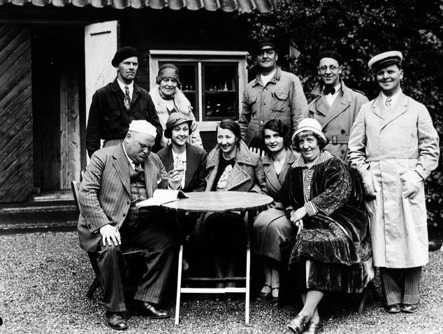 Tantolundens Friluftsteaters ensemble 1930